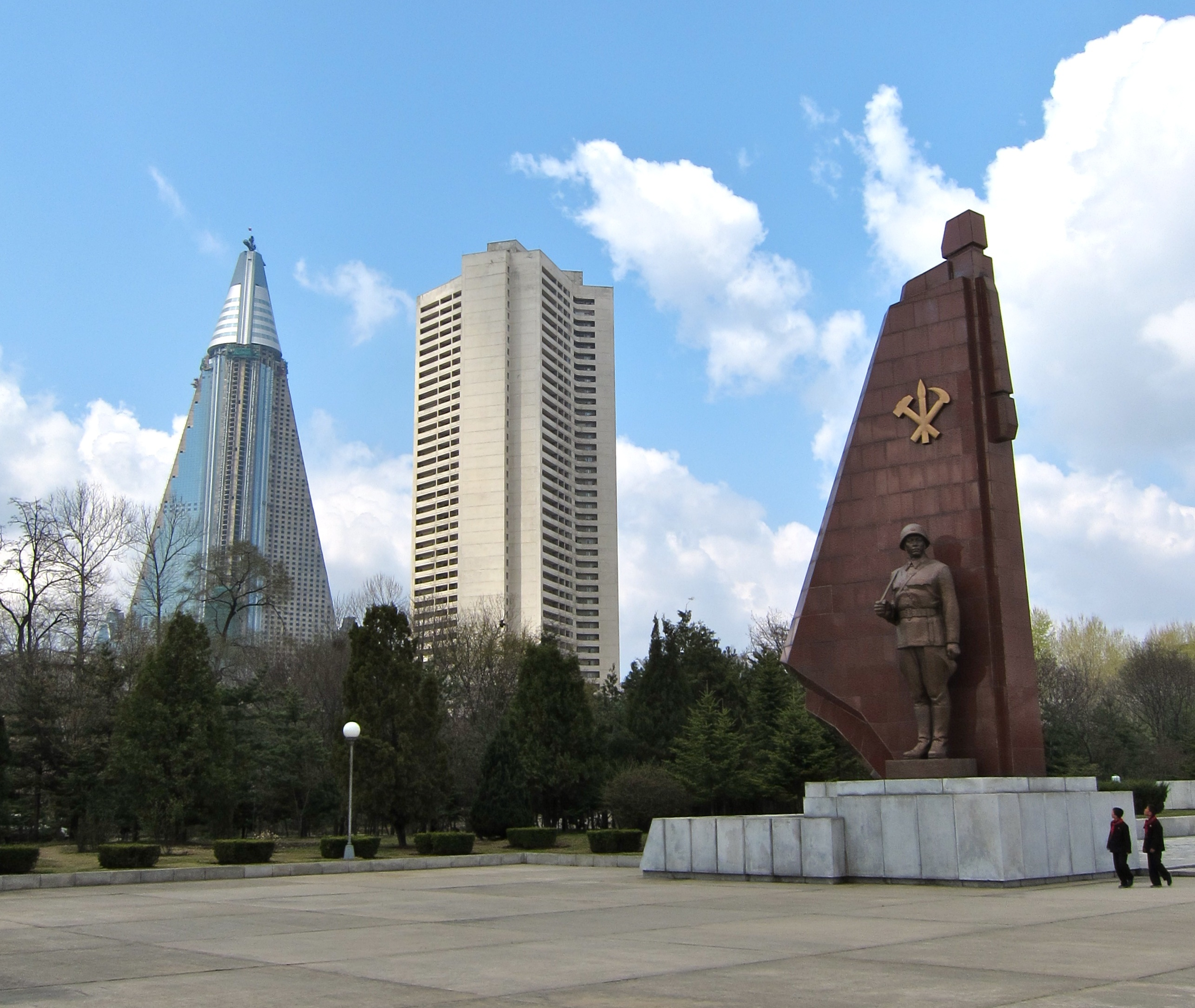 Pyongyang, DPRK (North Korea)